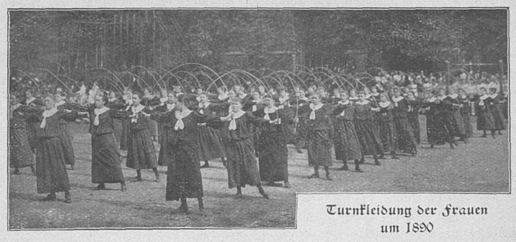 Frauenturnen der Hamburger Turnerschaft von 1816 um 1890